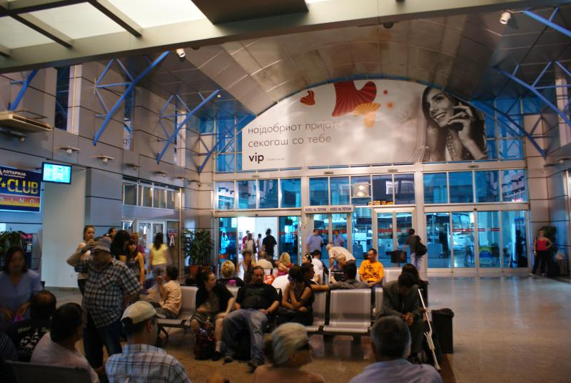 Skopje bus station